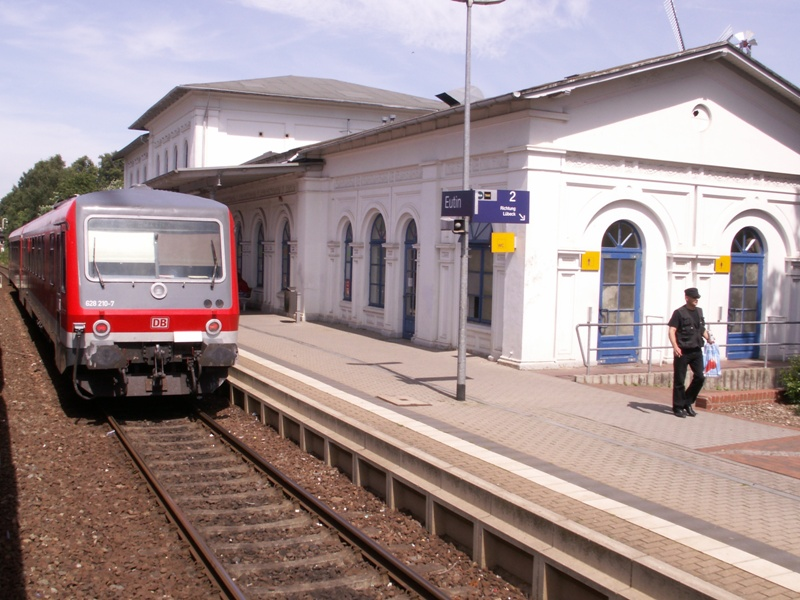 628 210-7 im Bahnhof Eutin